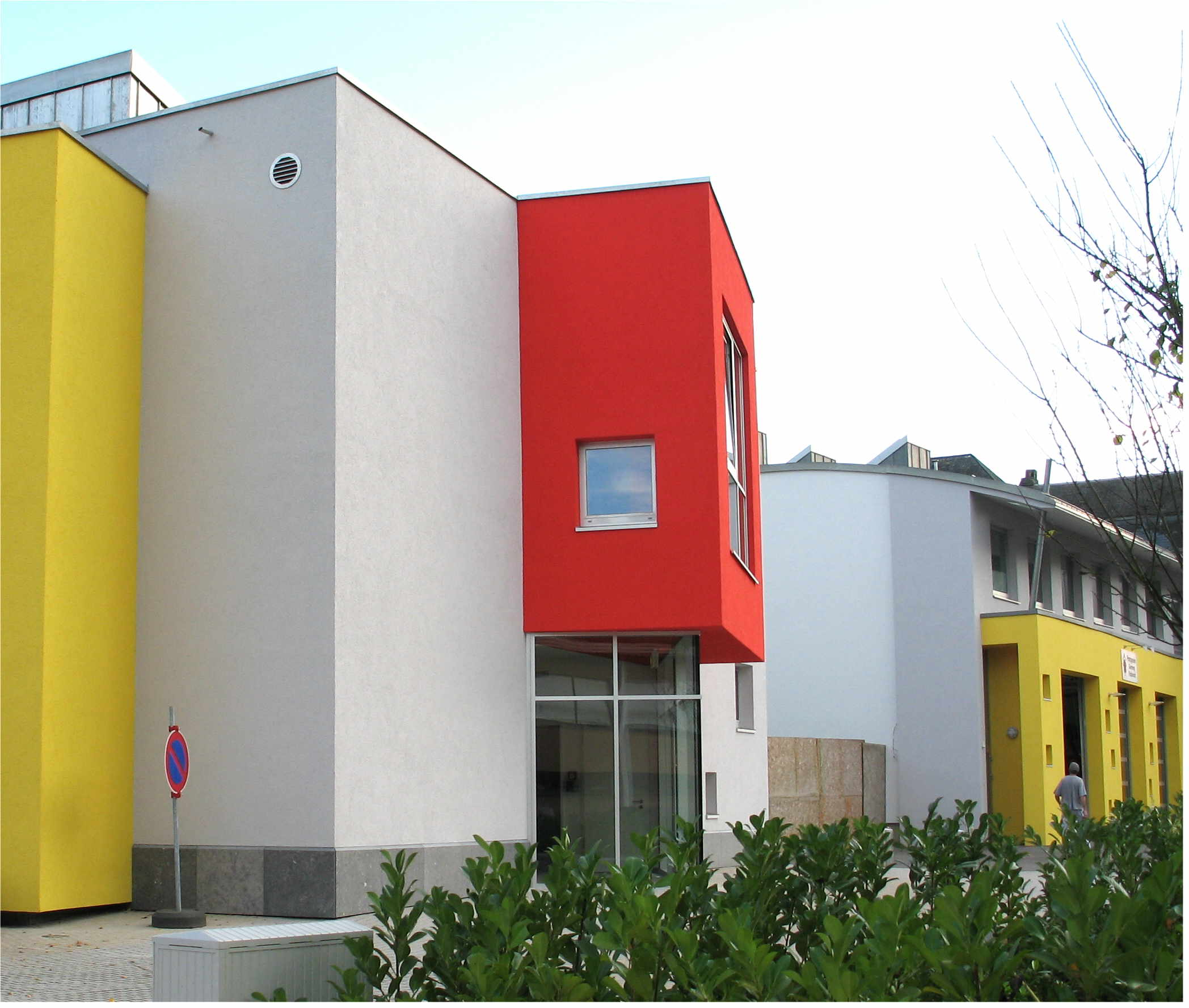 Beim Centre Culturel zu Koplescht. Kategorie:Gemeng Koplescht